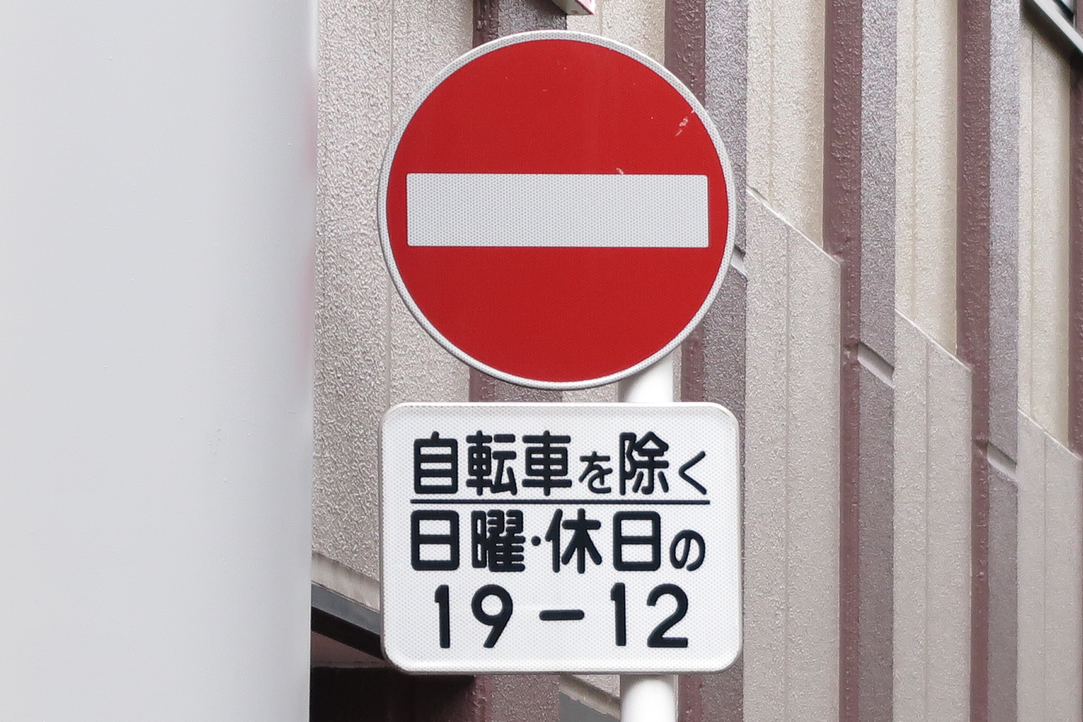 神楽坂商店街にある進入禁止（日曜休日の19時から翌12時を除く）